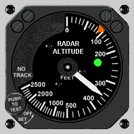 Radar Alitimeter.